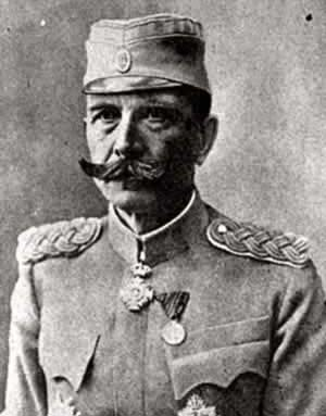 Petar Bojović, Serbian Duke, Field Marshal (b.1858-d.1945)